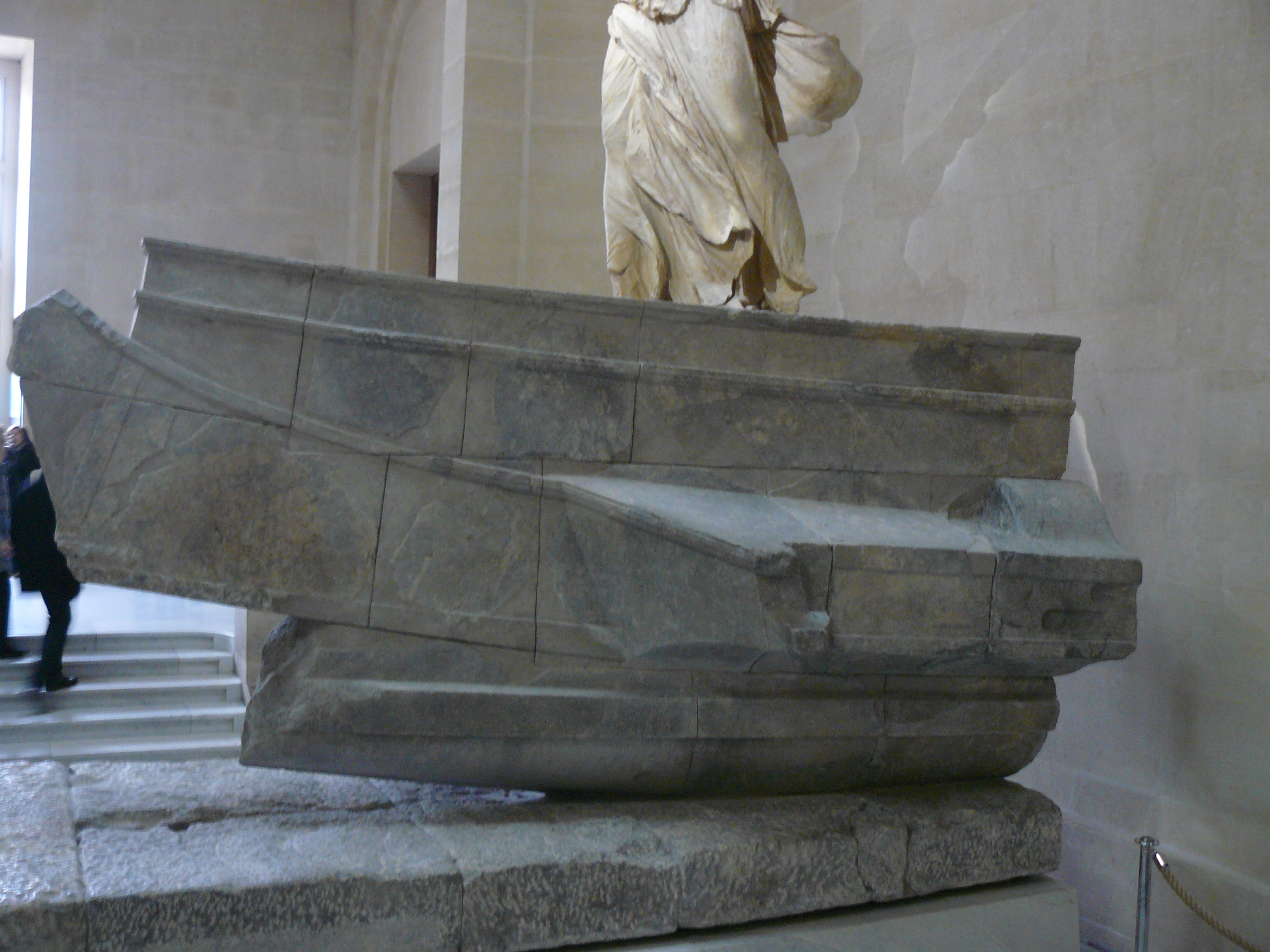 Détail des blocs en marbre de Rhodes de la proue de la statue.